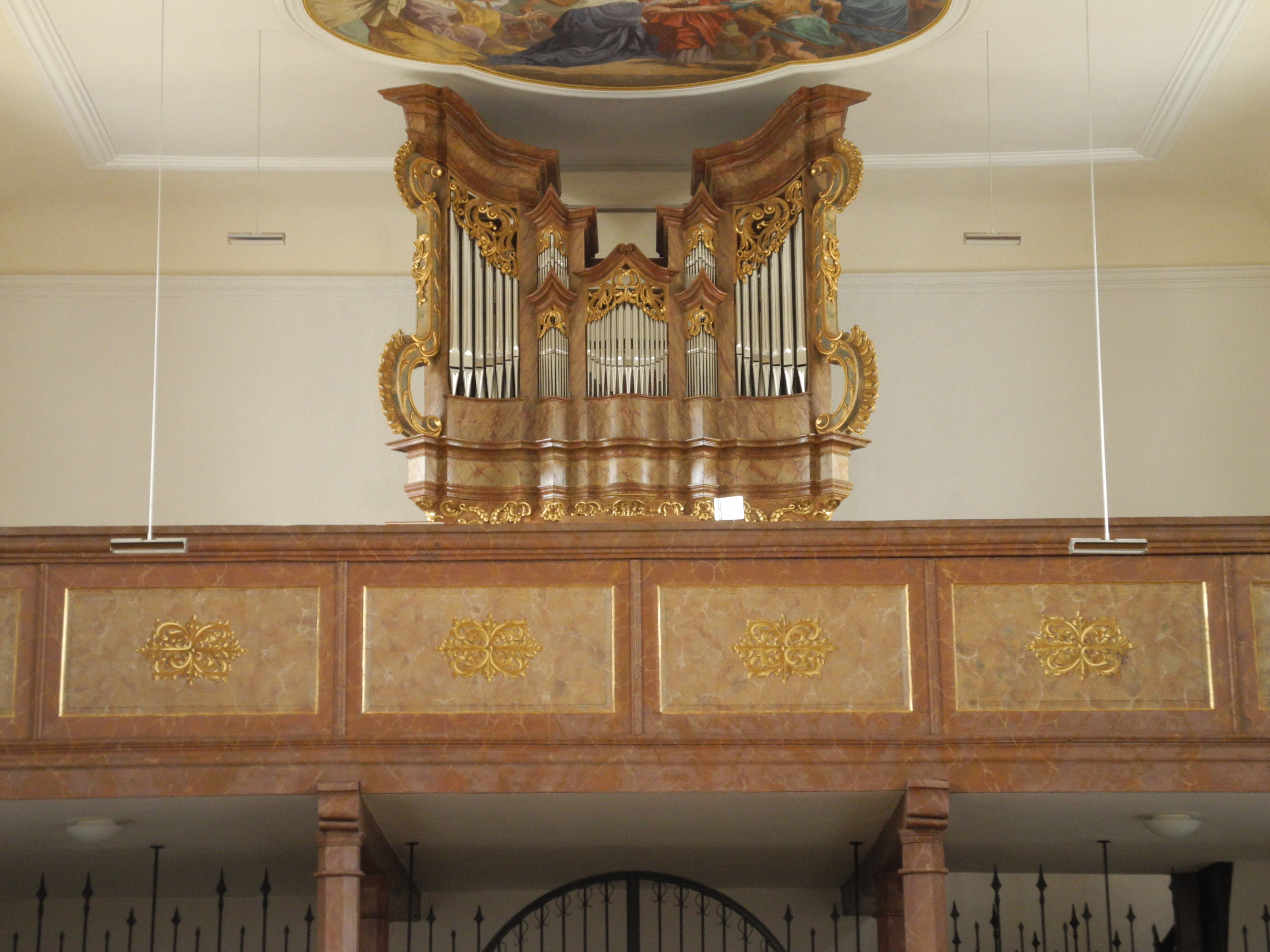 Böhmischbruck, Mariä Himmelfahrt, Orgel, Gehäuse Andreas Weiss, Werk Kuback 2009